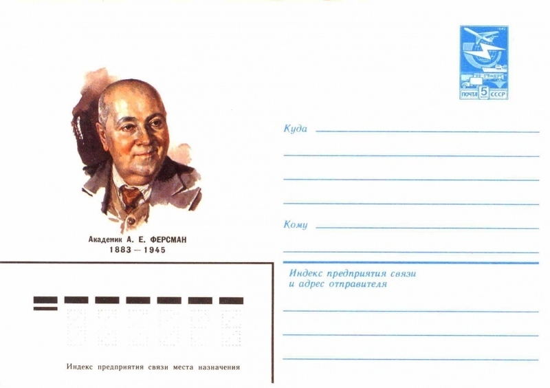 Художественные маркированные конверты 1983 года.